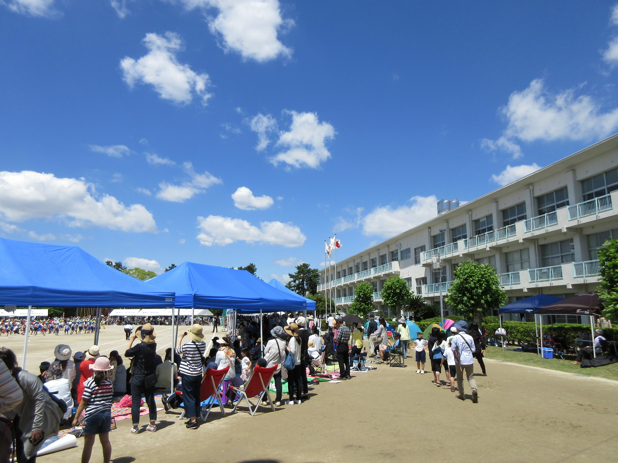 岡崎市立竜美丘小学校